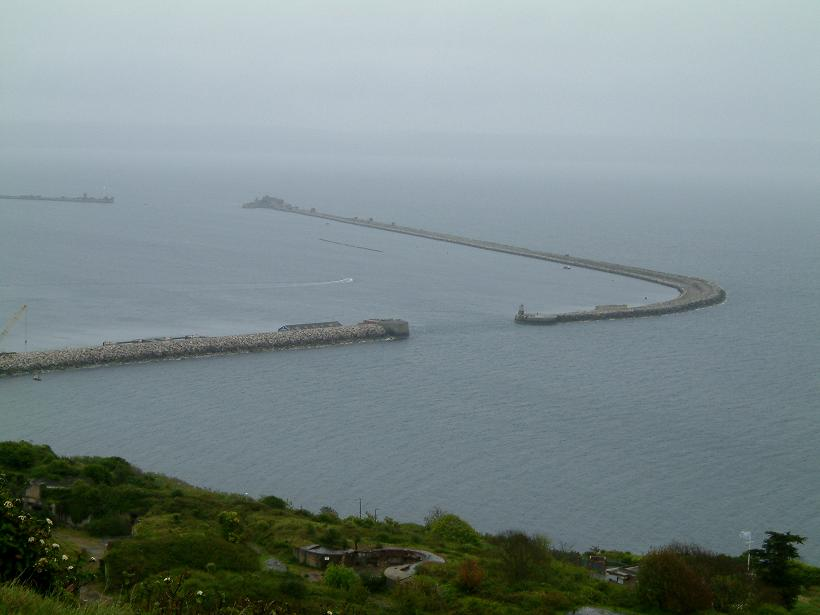 Mole des Hafens von Portland